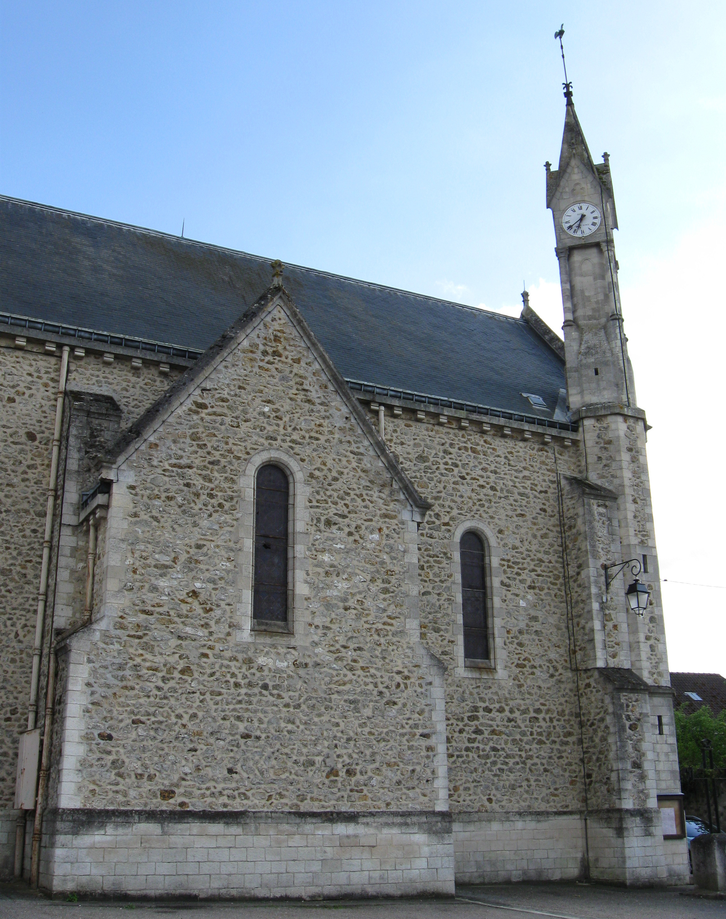 Église Saint-Étienne. (Ocquerre, département de la Seine-et-Marne, région Île-de-France).